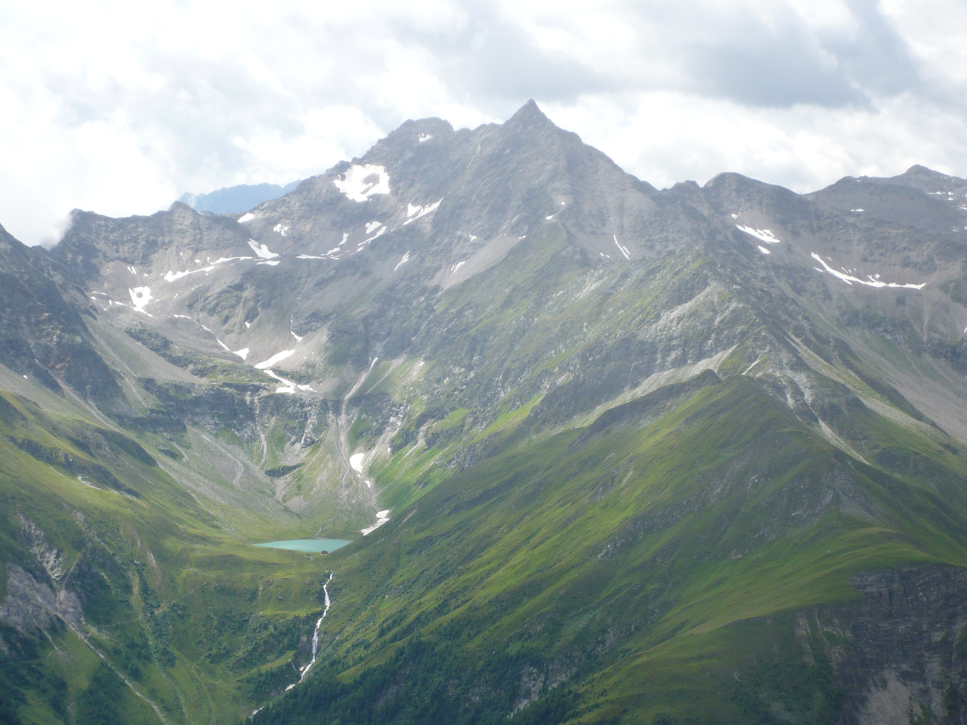 Der Lasörling, im Vordergrund Berger See mit Berger-See-Hütte.